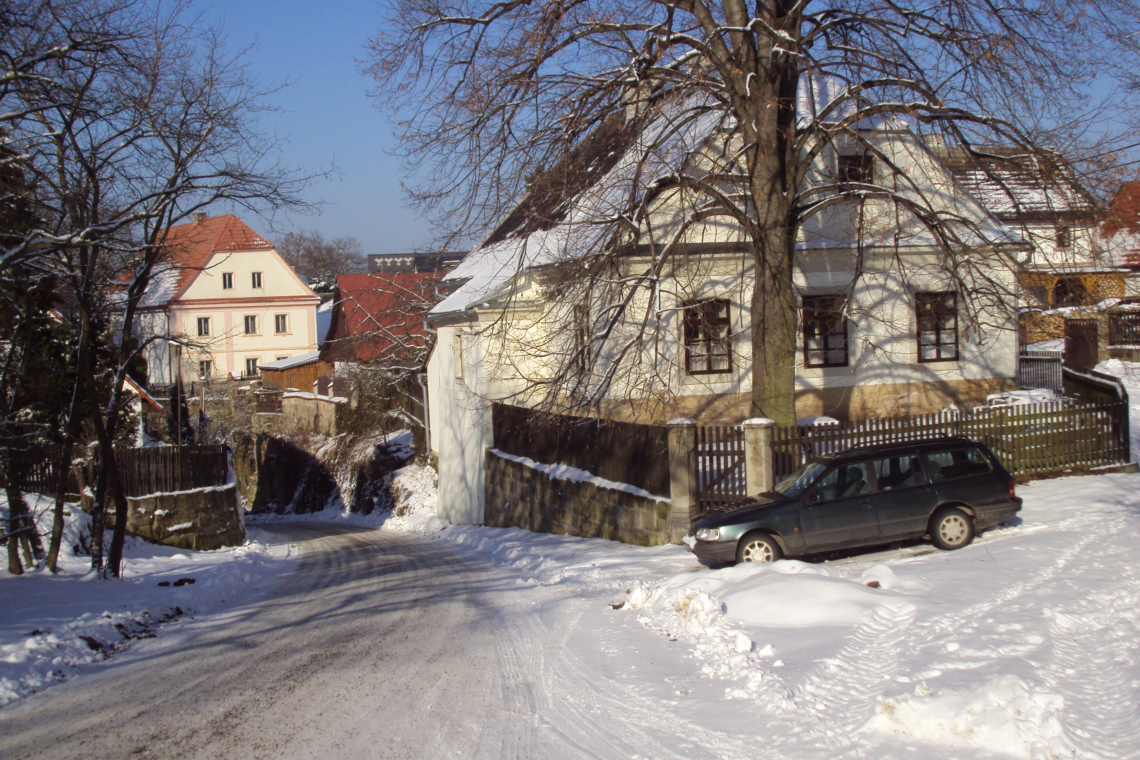 Střed vesnice Dražejov u Dubé